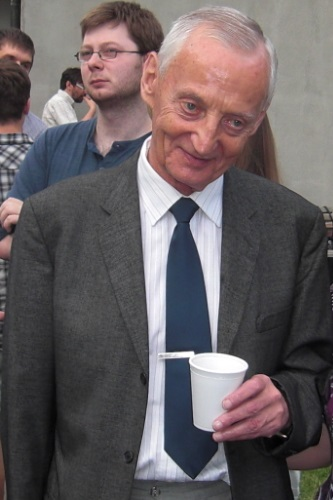 Mieczysław Kwiecień, zakończenie roku akademickeigo